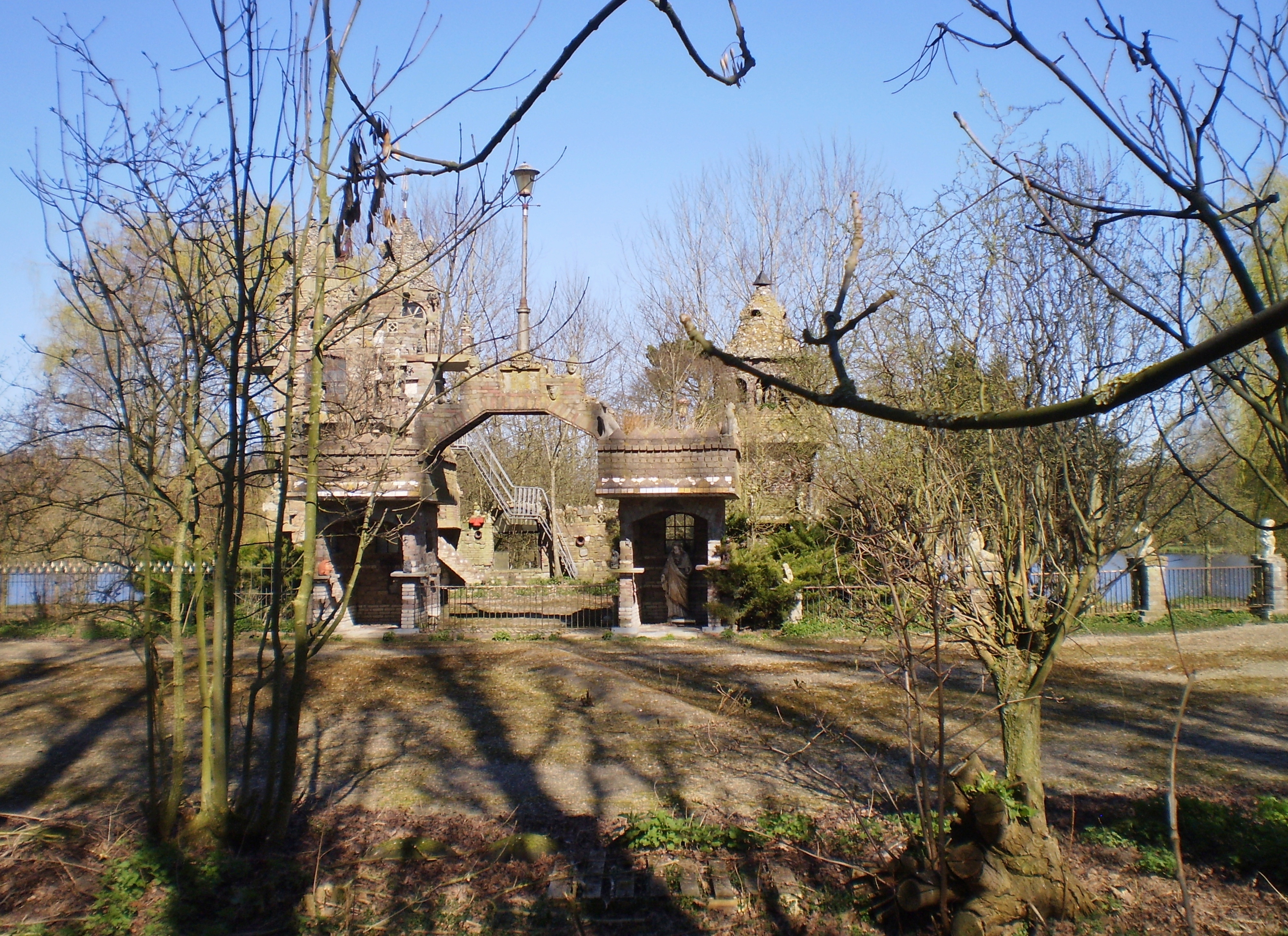 Hammetje